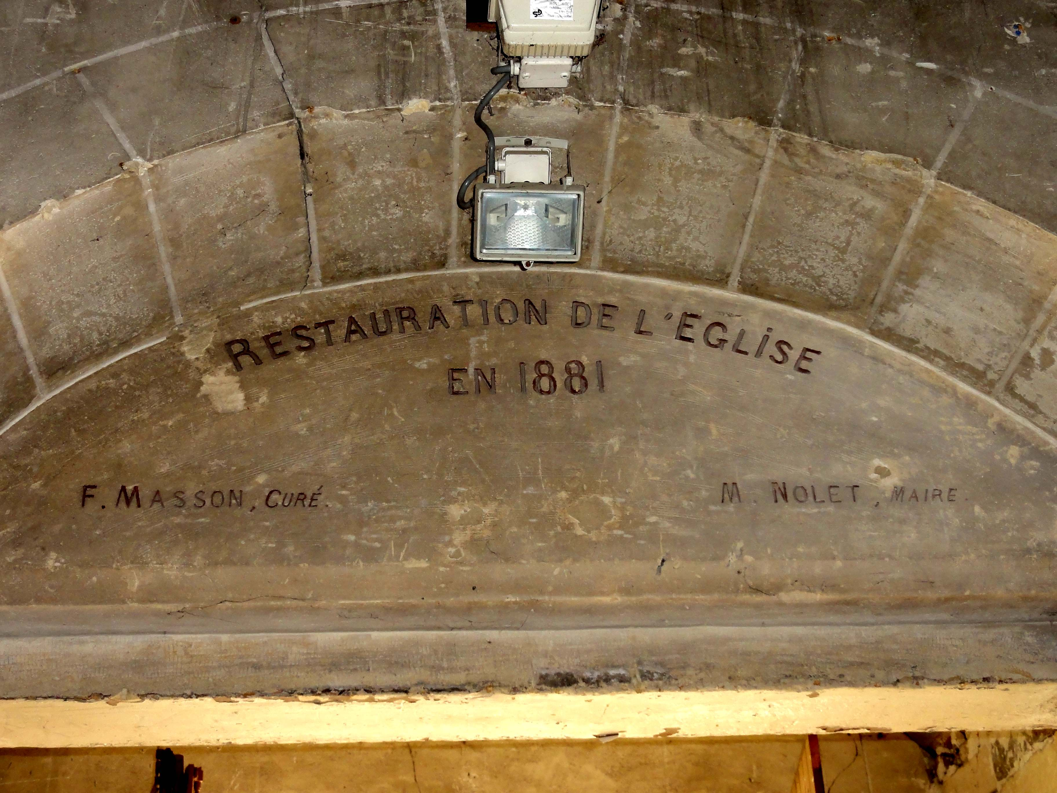 Mobilier de l'église (voir titre).